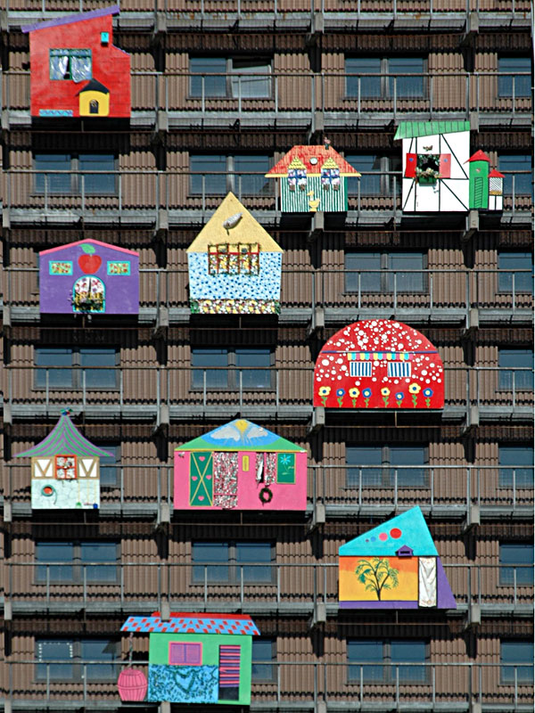 Kunstwerk das Glueck von HA Schult